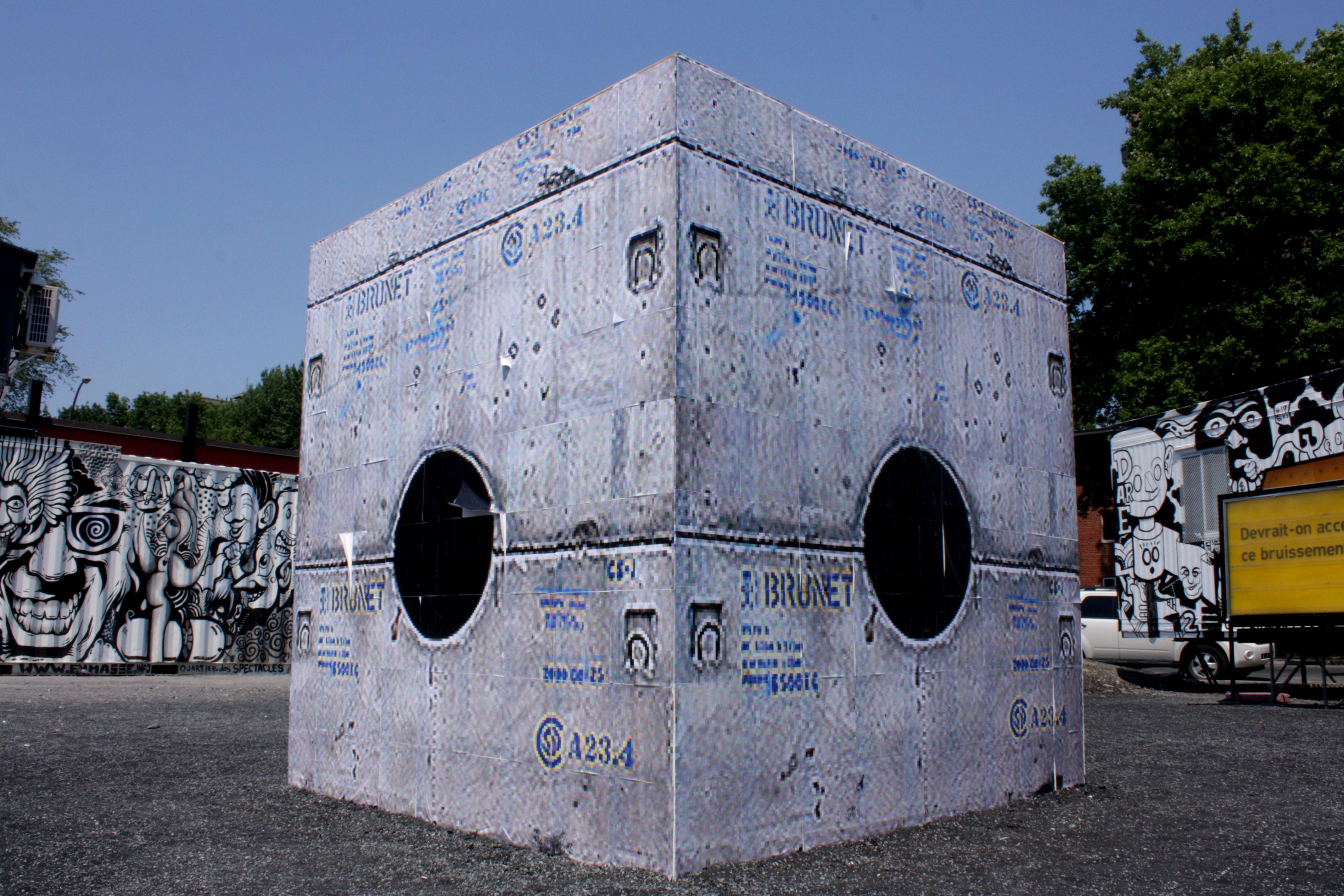 « Ces jours-ci, devant la roulotte de DARE-DARE, Ross Campbell nous présente son plus récent projet intitulé Distribution Box (la boîte de distribution). S'inspirant des matériaux et du contexte de notre environnement bâti, ce projet se décline en deux composantes : un objet sculptural exposé à même l'espace public et un modèle réduit en papier, reproduit en grande quantité. La Boîte de distribution est une réplique grandeur nature d'un regard de raccordement, tel qu'utilisé par la direction des travaux publics pour connecter les canalisations hydrauliques souterraines. »